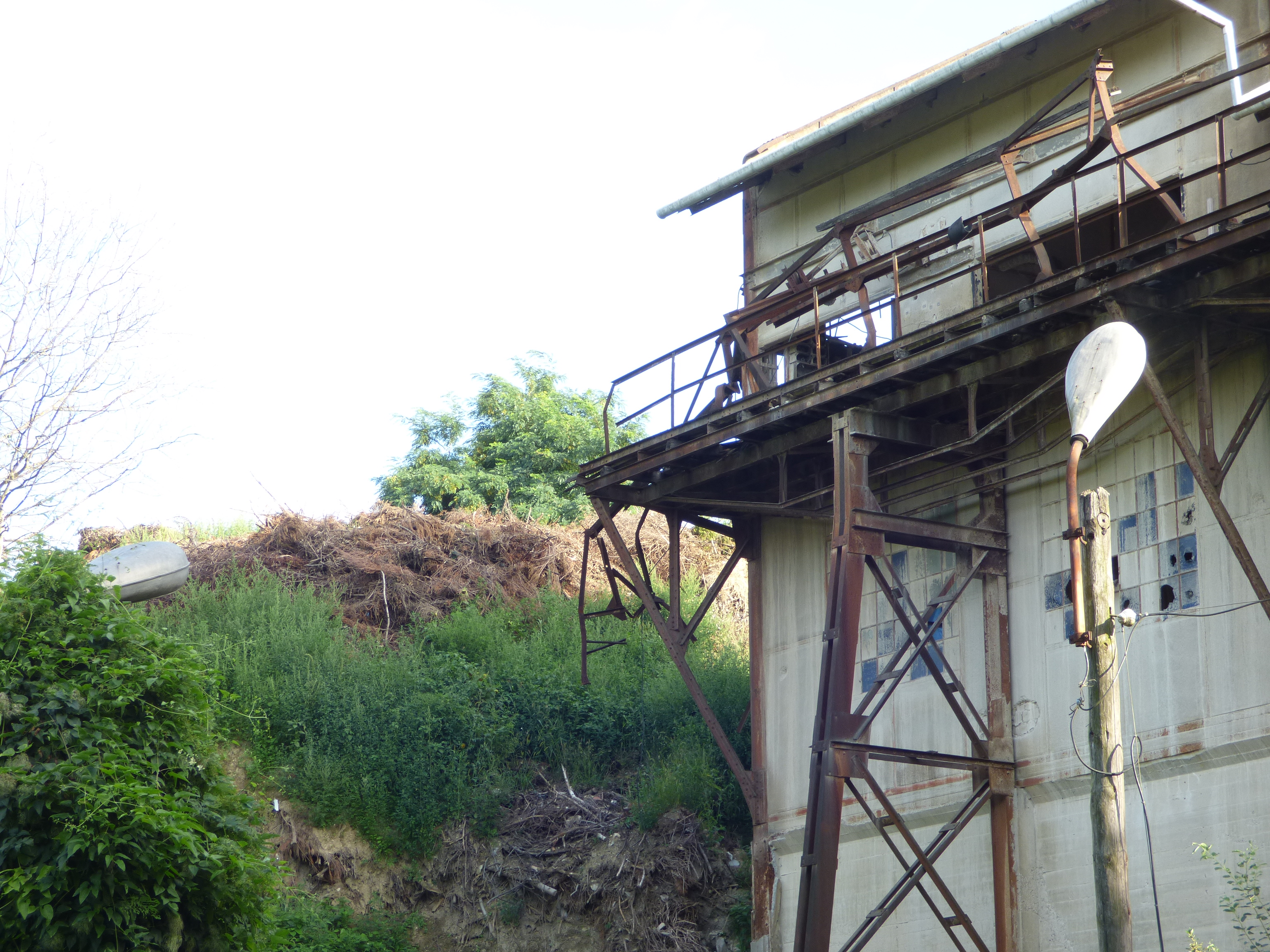 A solymártelepi szénosztályozó részben elbontott híddal